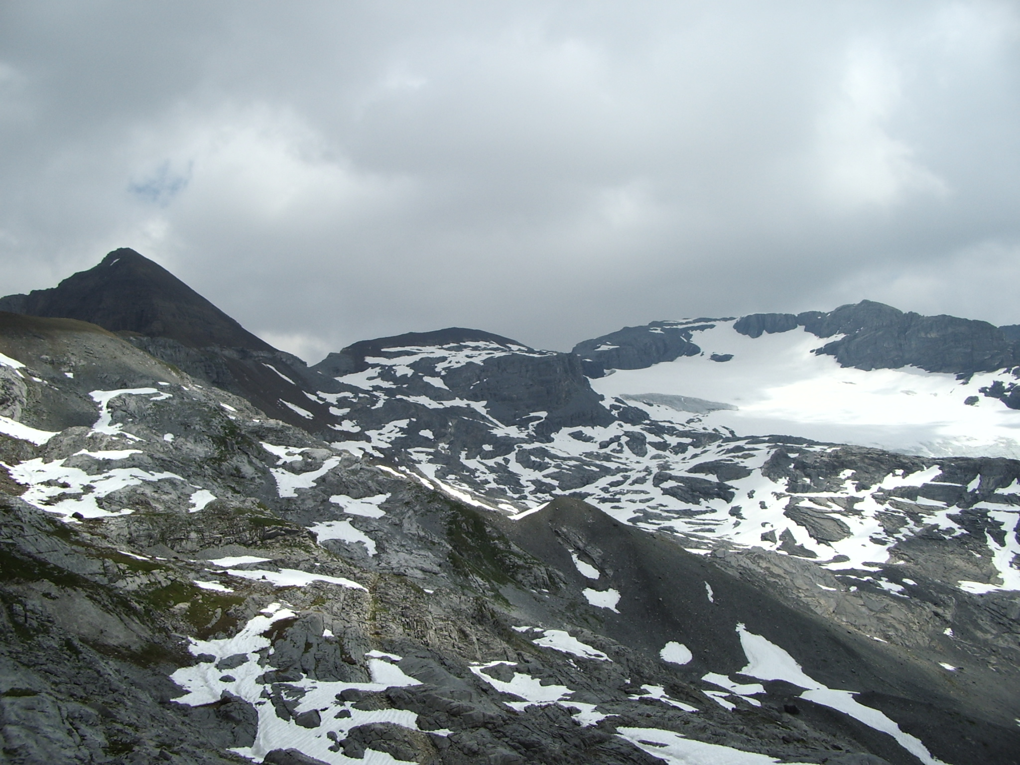 zelf gemaakte foto